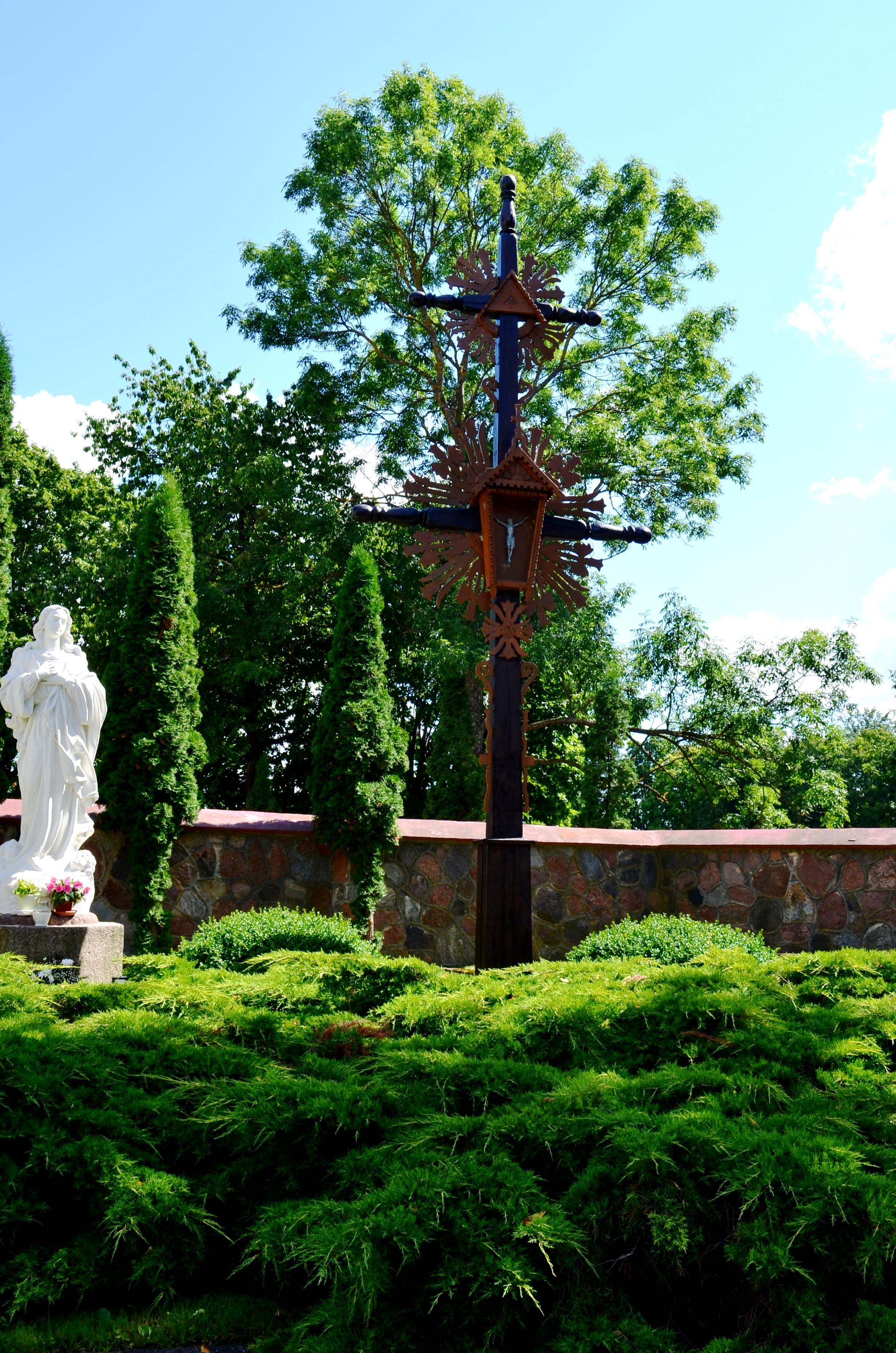 Kretingos bažnyčios medinis kryžius su koplytėle